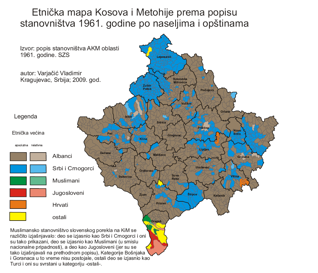 Etnička mapa Kosovsko-metohijske oblasti prema popisu stanovništva SFRJ iz 1961. godine.